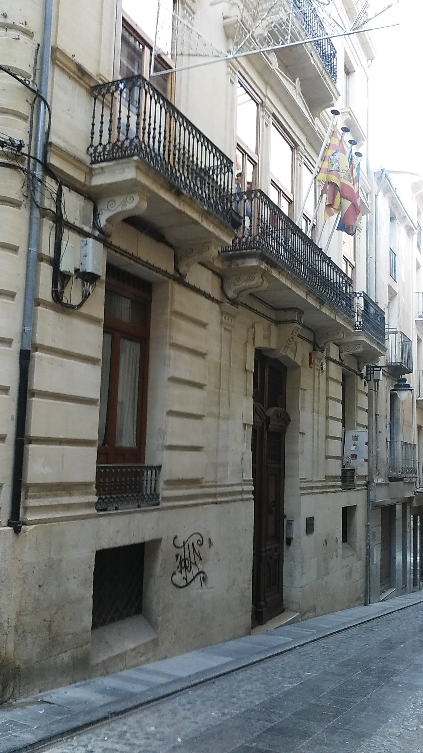 Seu de la Banca Vicens en Alcoy (Alacant).